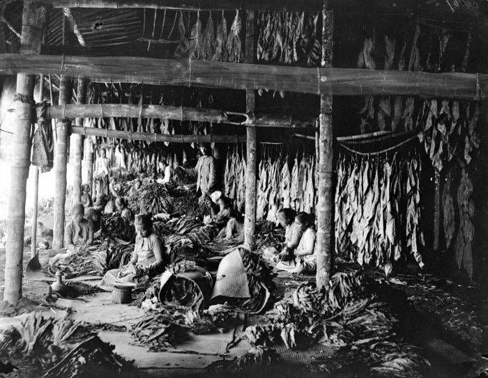 Negatief. Arbeiders aan het werk in tabaksfabriek Kali Pantjing, Oost-Java